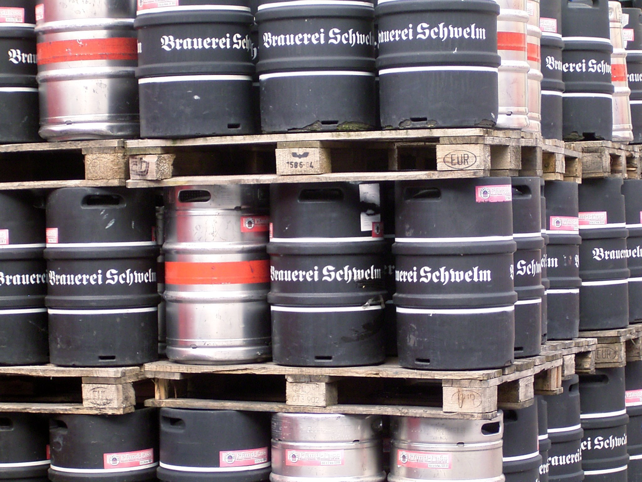 Brauerei Schwelm